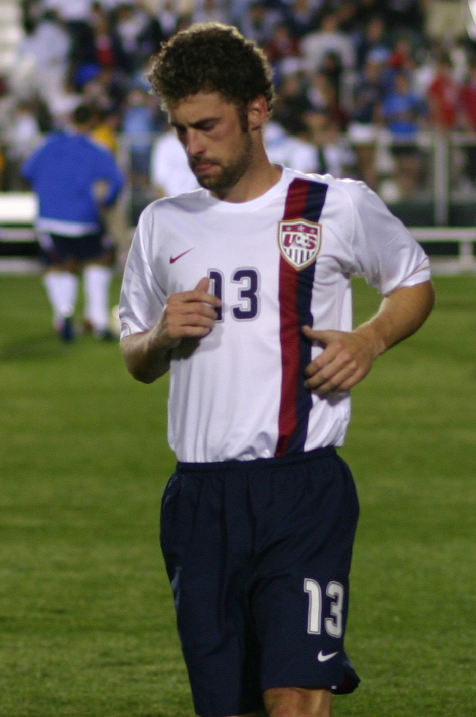 Pat Noonan during a USMNT vs. JamaicaIMG_0508